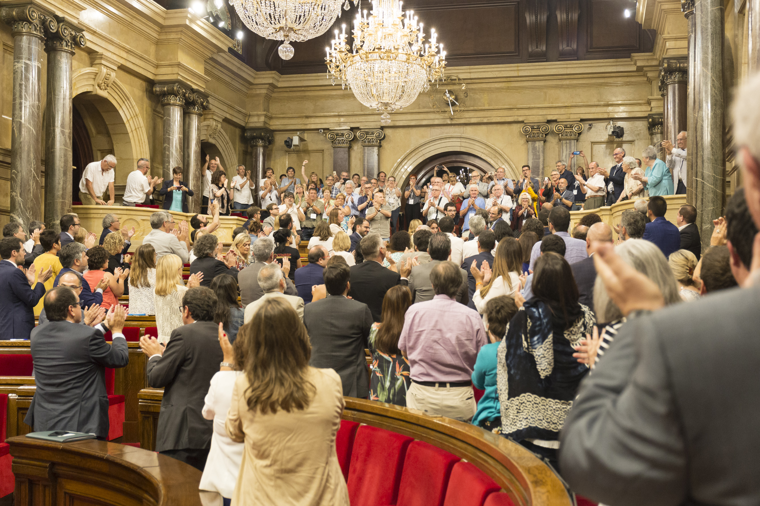 Parlament de Catalunya, 29 de juny de 2017. El Ple i el públic aplaudint després de l'aprovació de la llei que declara nuls els judicis franquistes.